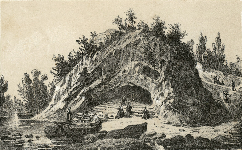 Des pèlerins à la grotte de Lourdes vers 1860. Massabielle.